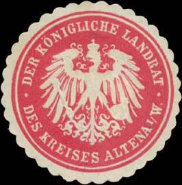 Sealing stamp Title: Der Königliche Landrat des Kreises Altena i/W. Description: rot, weiß, geprägt Place: Altena size: cm